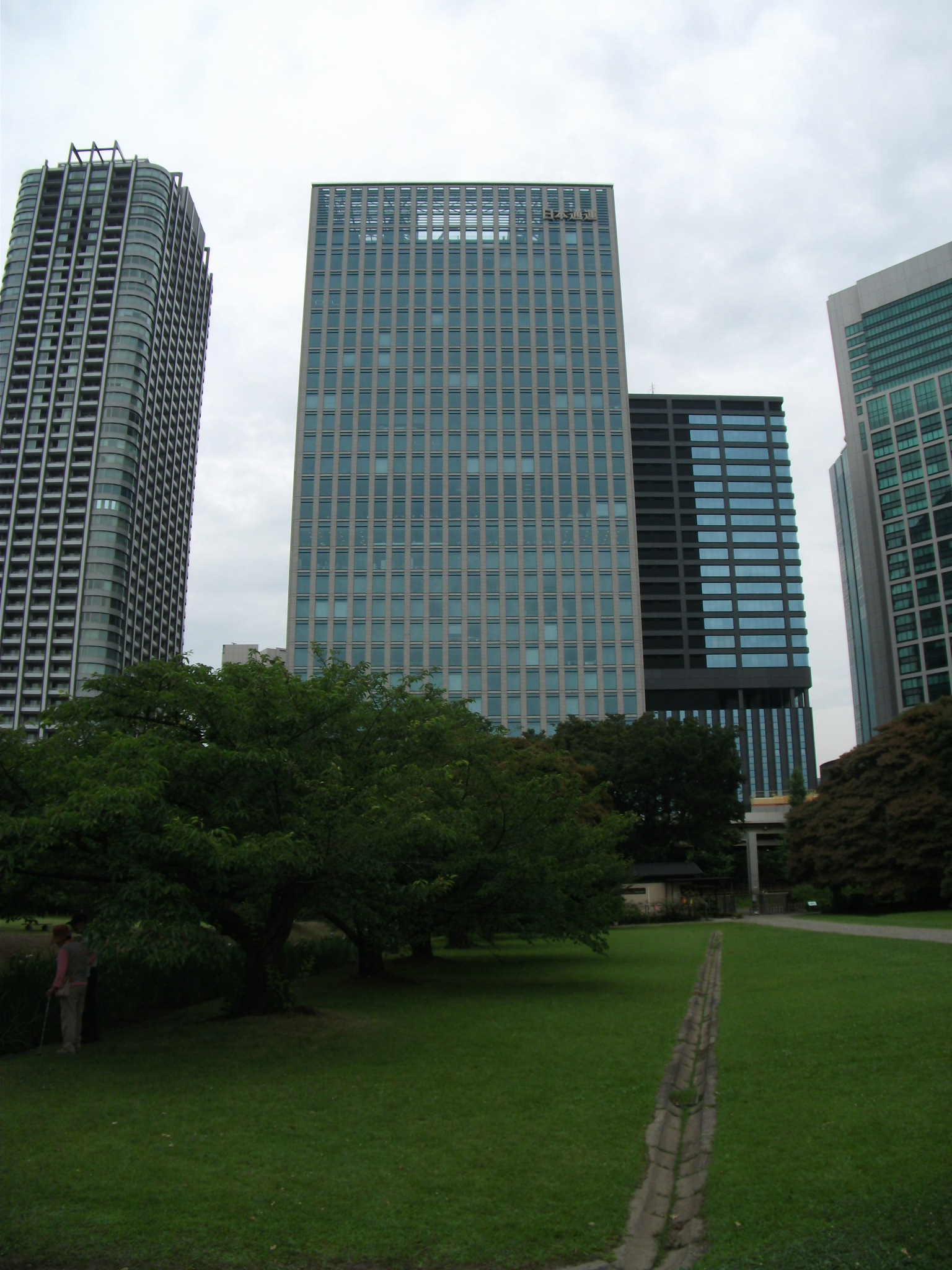 日本通運本社ビル